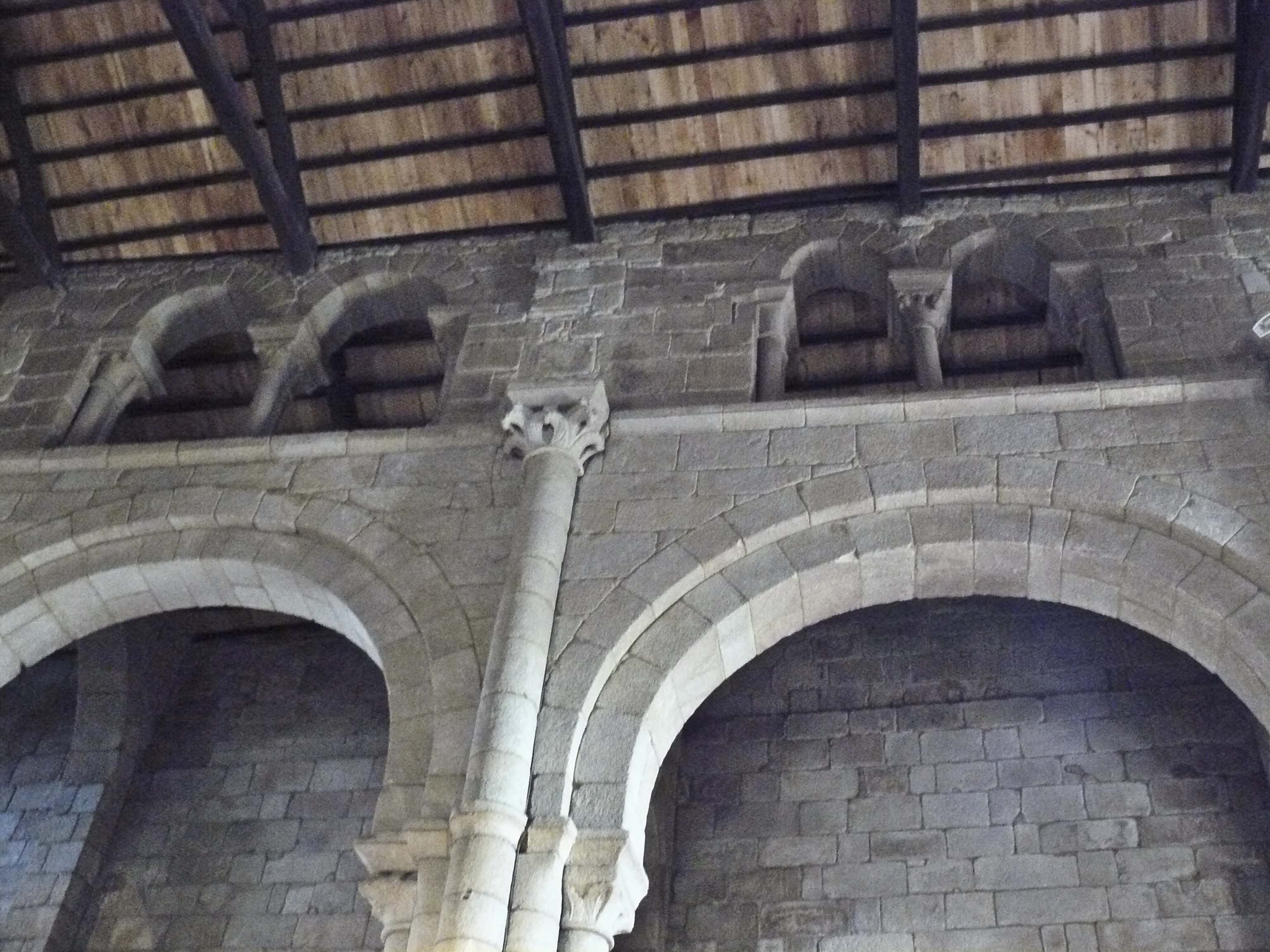 Triforio-Mosteiro de Aciveiro